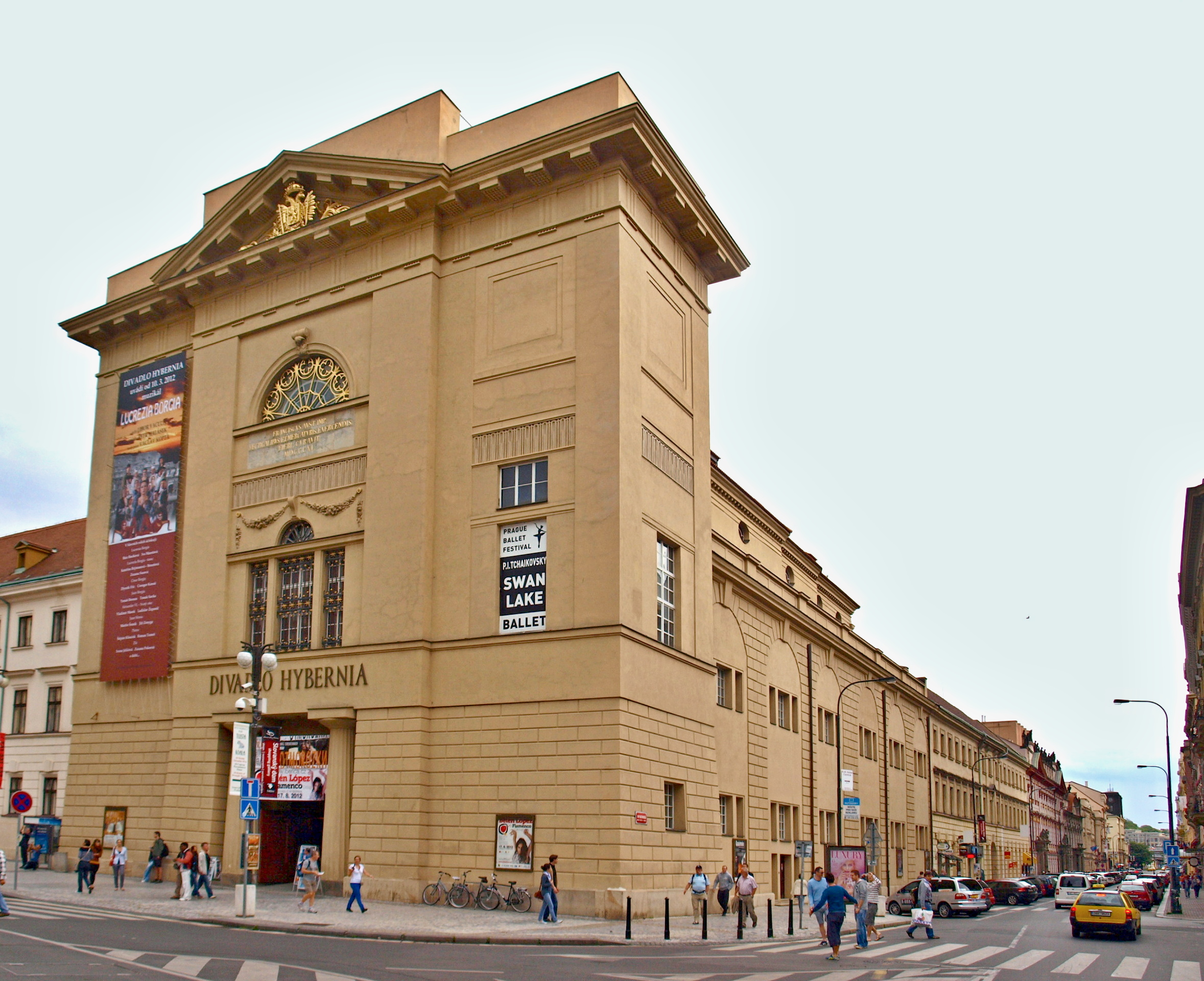 U Hybernů